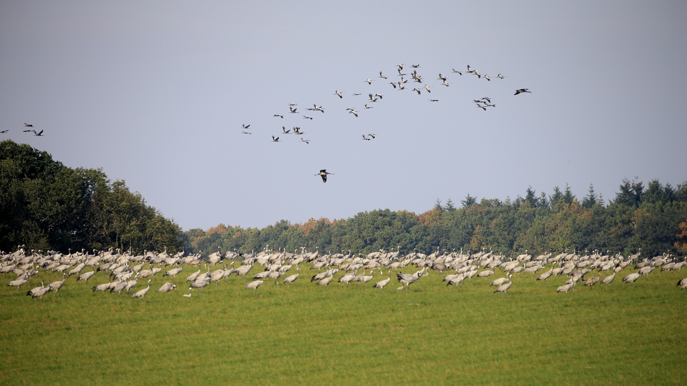 Rastende Kraniche in Mecklenburg